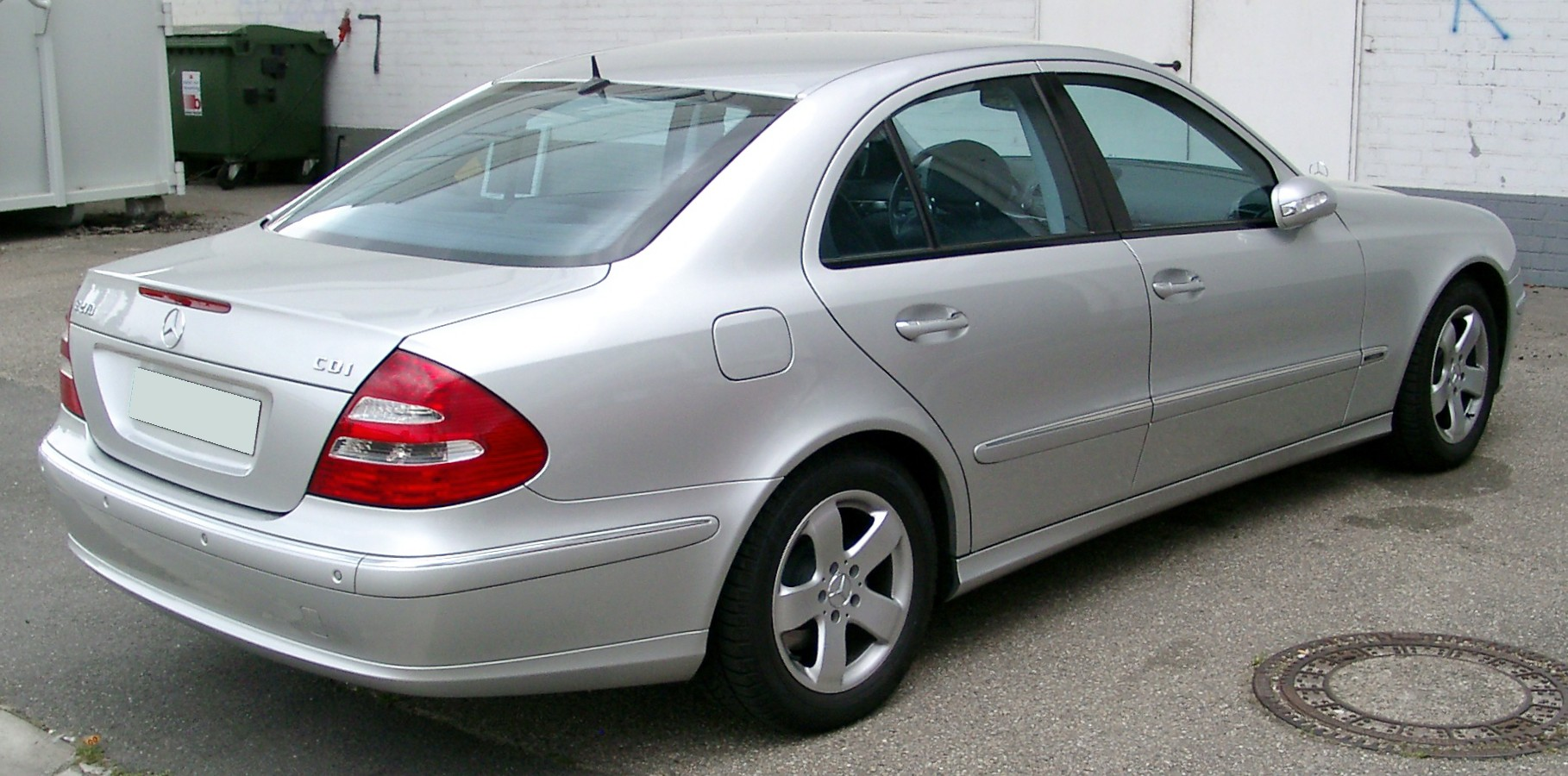 Mercedes-Benz W211